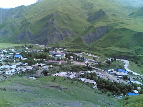 Вачи, Лакия (фото1)